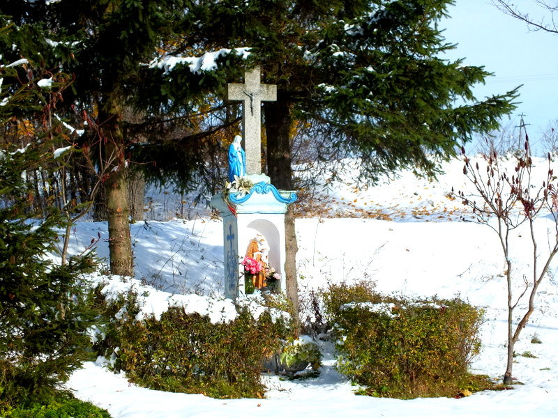 Przedwojów, kapliczka św. Antoniego